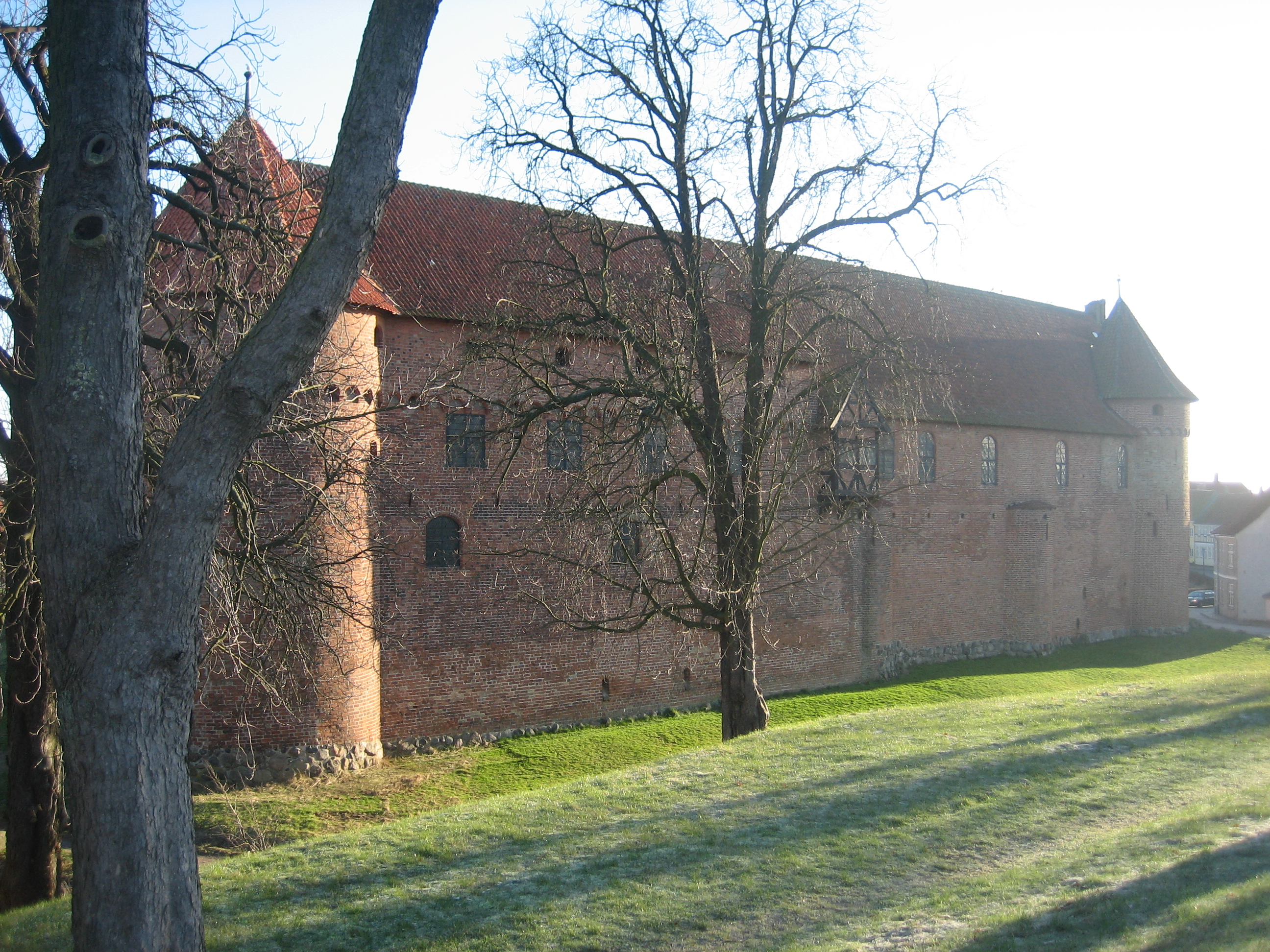 Nyborg Castle, Denmark. Winter image.